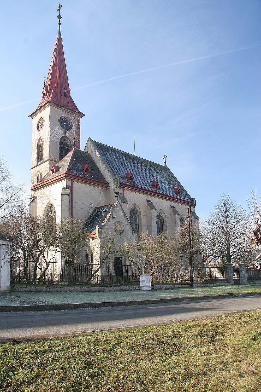 Veletov - kostel Zvěstování Panny Marie, district Kolín autor: Prazak date: 5. 2. 2007